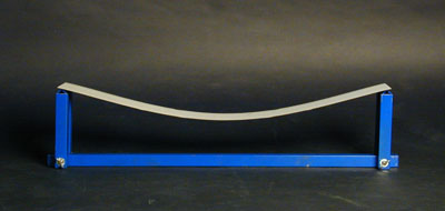 Sandwichelement ohne Verbund.